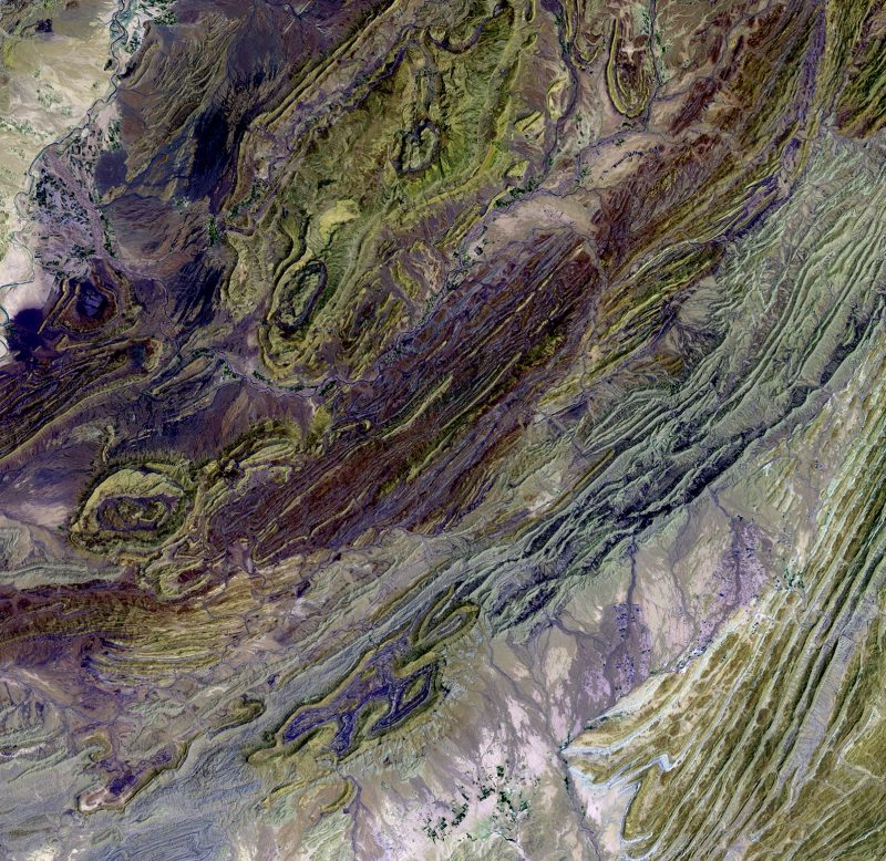 Sulaiman Mountains